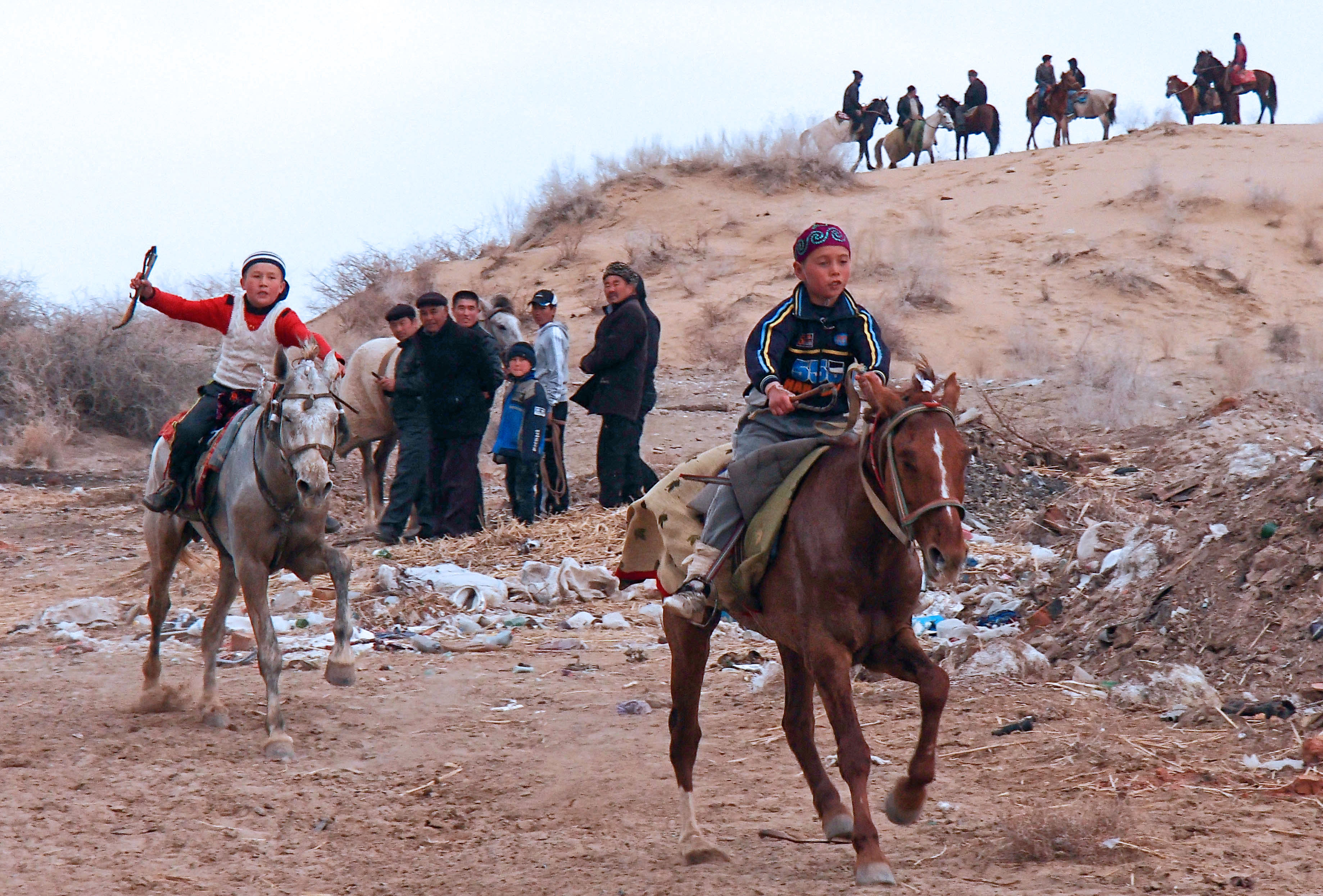 race in Taxtako'pir, Karakalpakstan, Uzbekistan